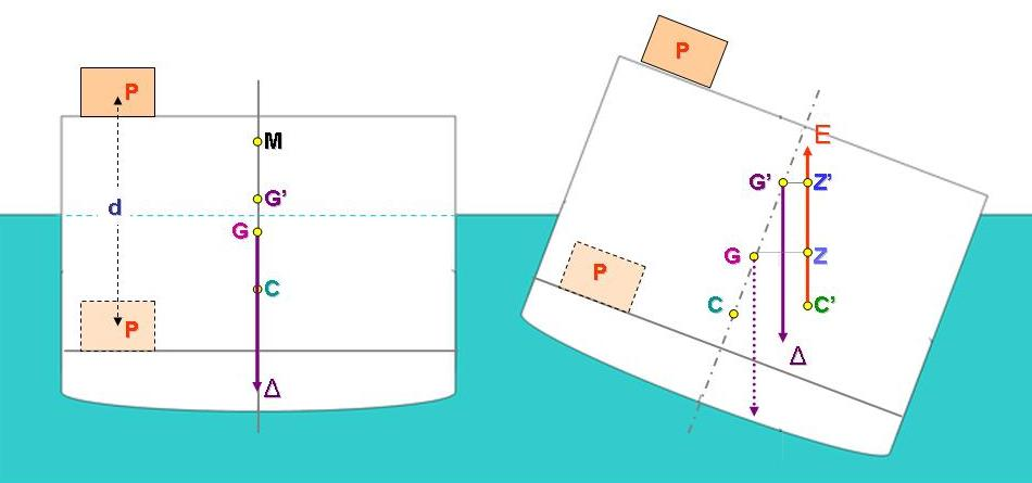 Efecto sobre la estabilidad transversal de un buque del traslado vertical de pesos.